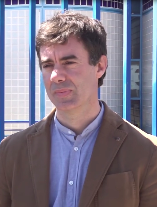 Irene Montero, Ione Belarra, Rafa Mayoral y Eduardo Santos visitan el CIE de Aluche.